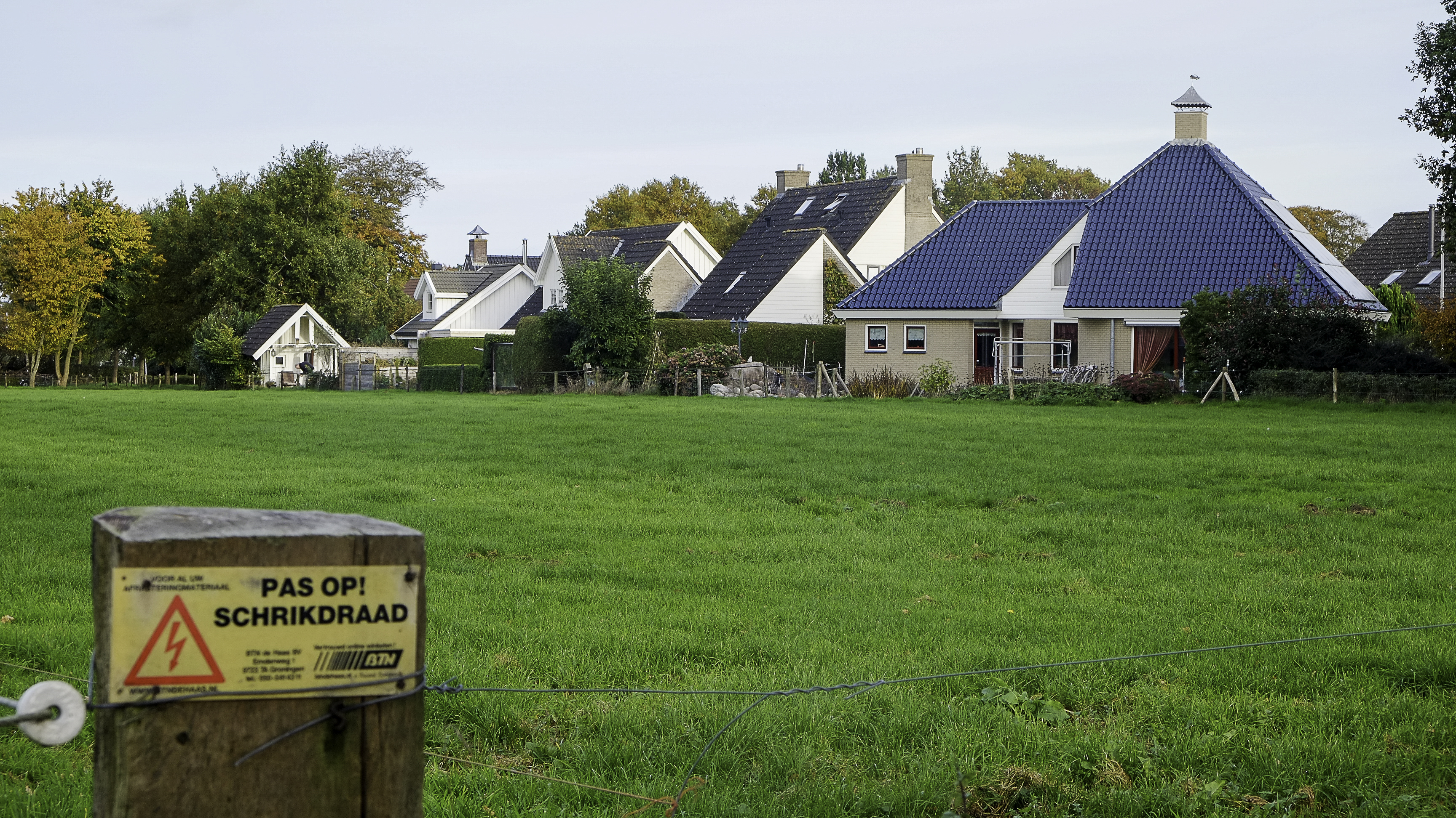 Huizen aan de Steegakkers in Noordlaren. Vanwege de witte kleur worden deze ook wel pejoratief aangeduid als 'witte schimmel'.